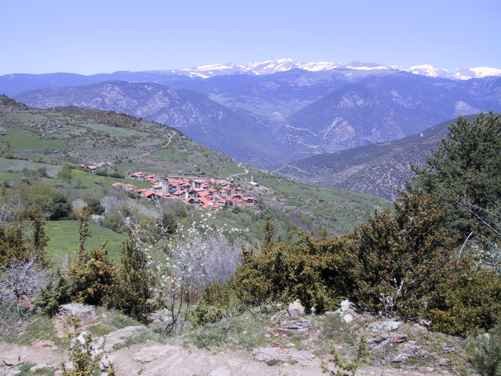 Poble d'Ansovell vist des del camí vell que porta a l'ermita de Boscalt